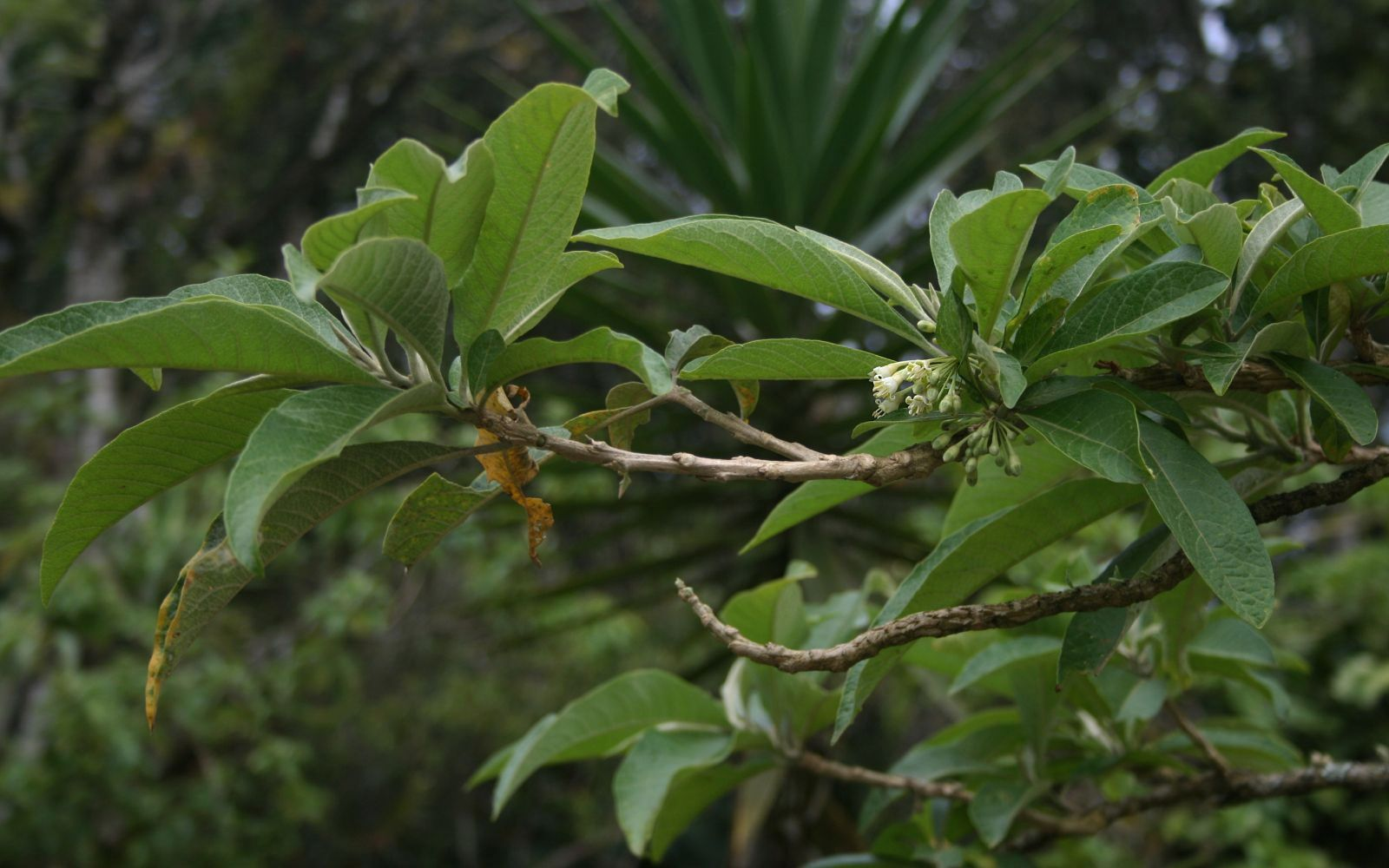 Acnistus arborescens, Nachtschattengewächse (Solanaceae) - Costa Rica: Prov. Cartago, Paraíso, Jardín Botánico Lankester/Lankester Botanical Garden